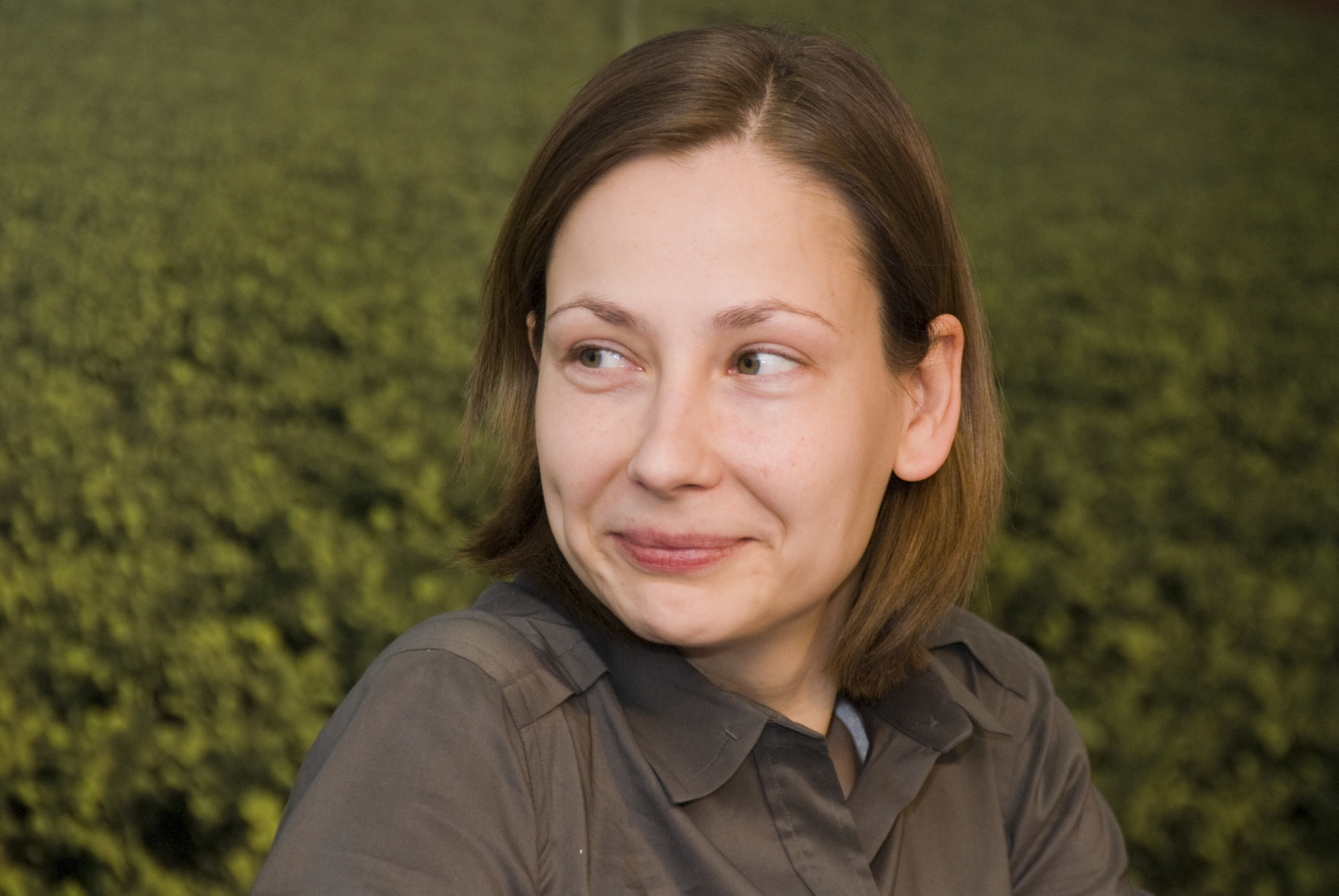 federaal minister van Overheidsbedrijven en Ambtenarenzaken Inge Vervotte